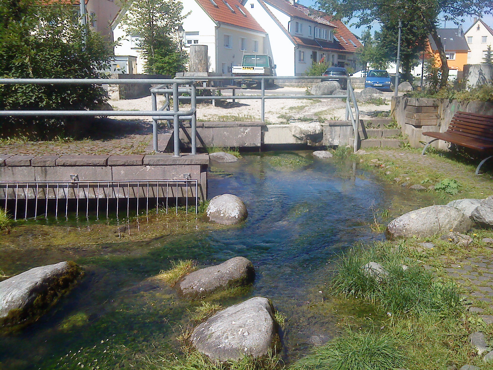 Die Fehlaquelle in Burladingen